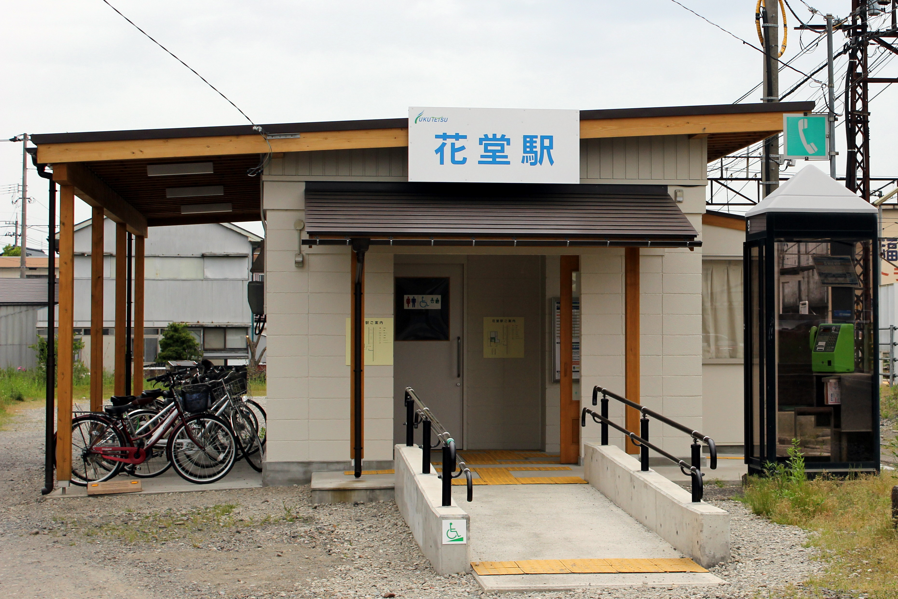 福井鉄道 花堂駅 駅舎 2013/05/19